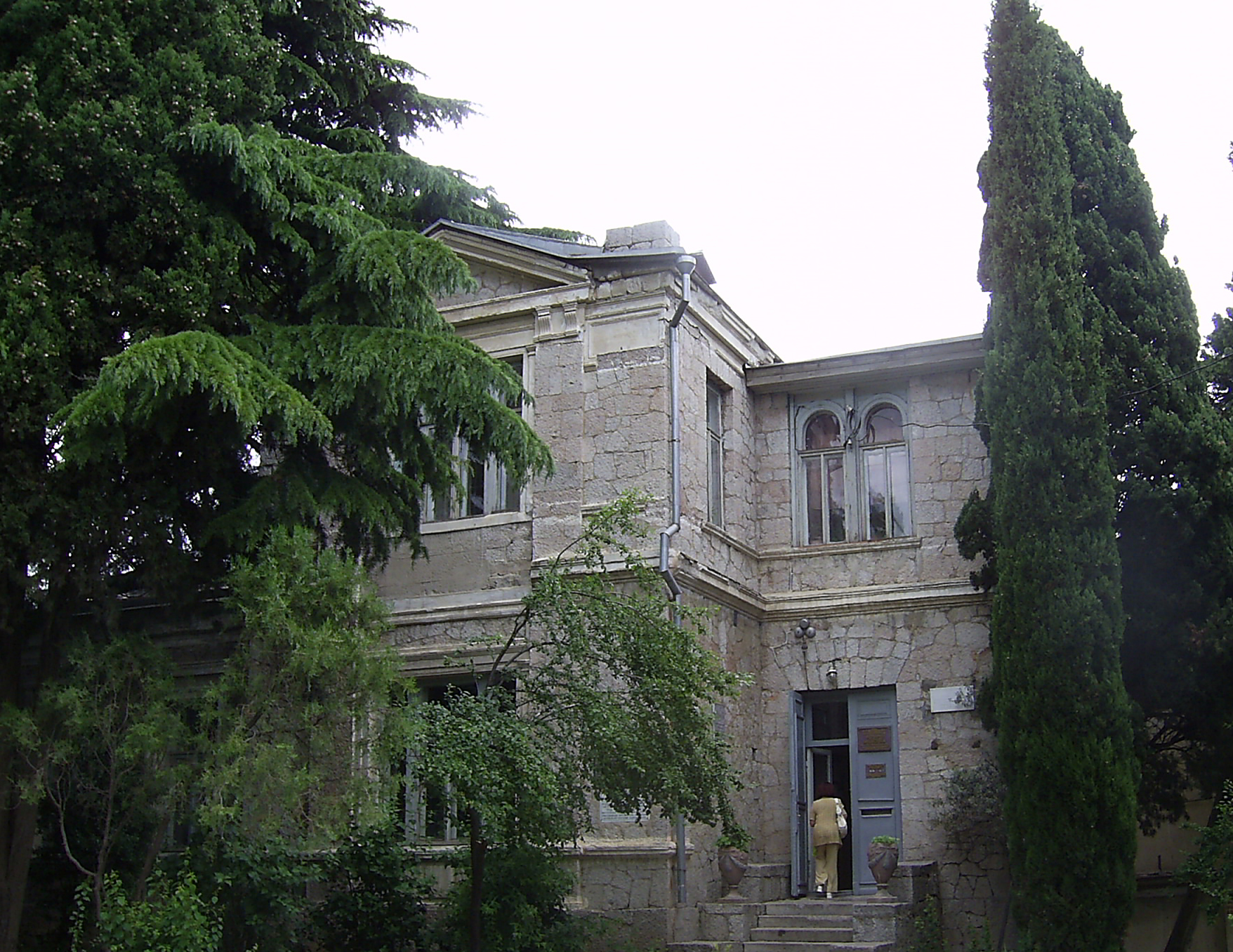 Дача "Голубка" в Алуште